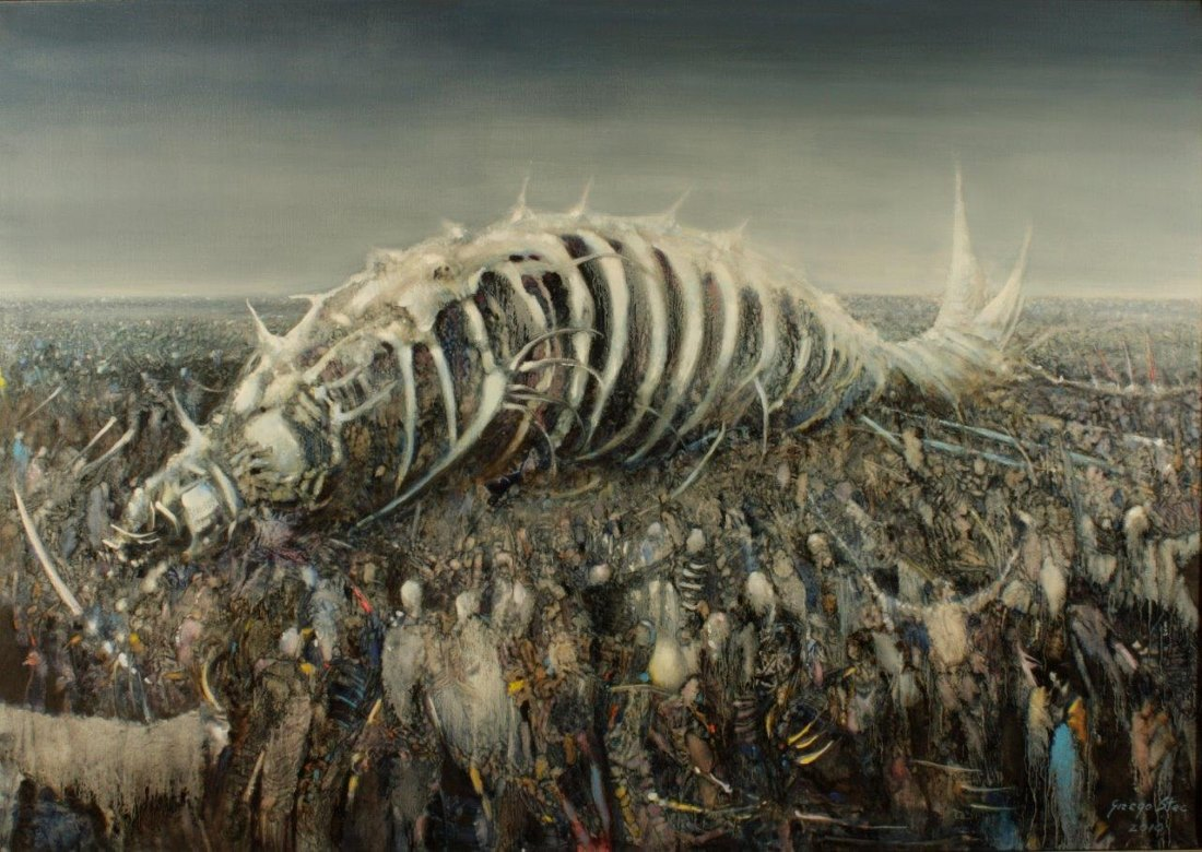 Hunger